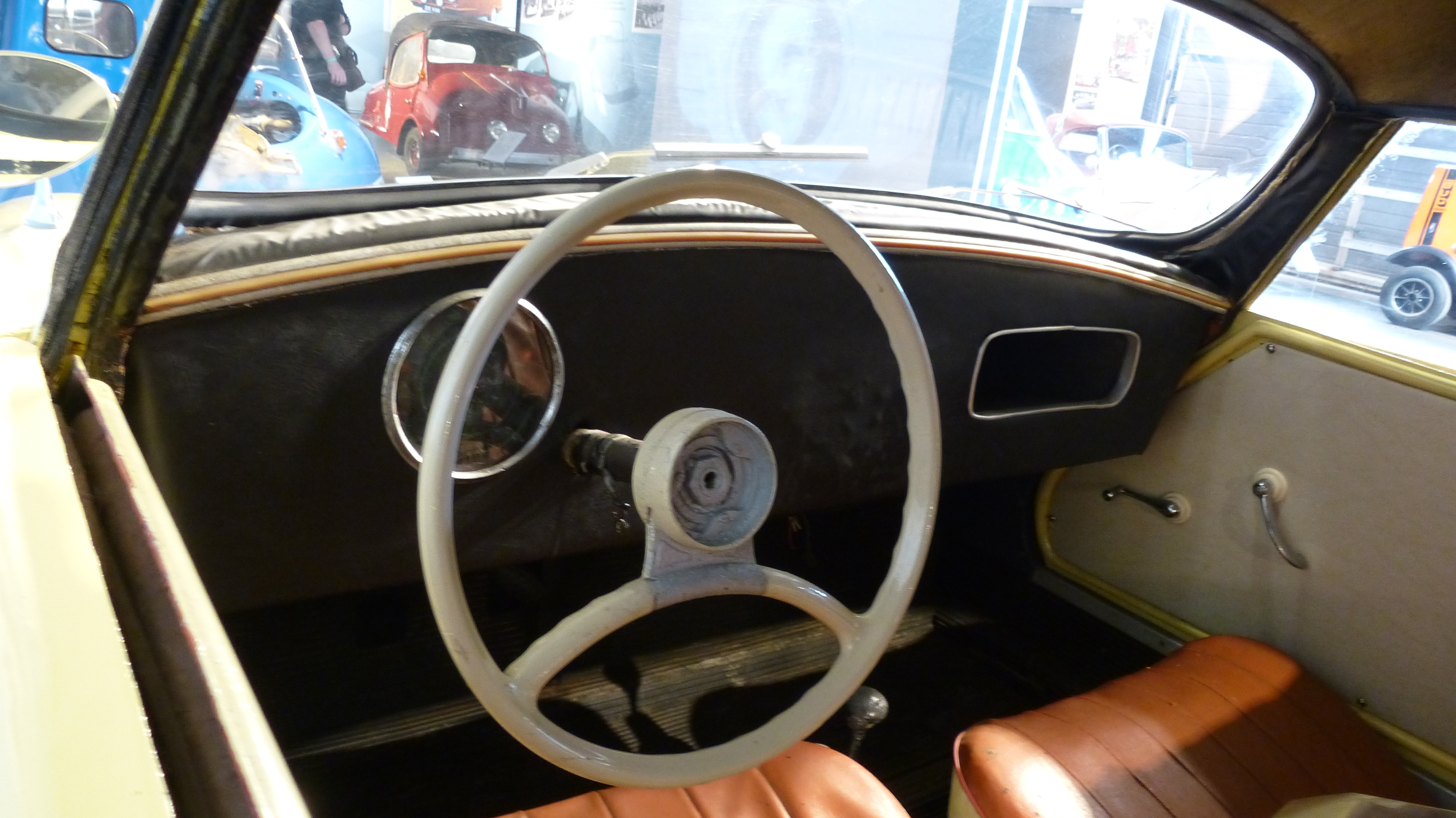 Weidner 70 S von 1958 Interieur